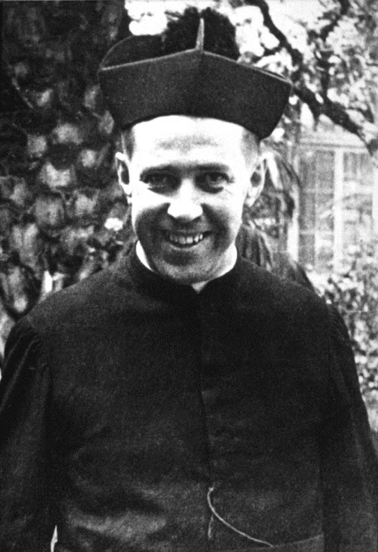 Luis Alberto Miguel Hurtado Cruchaga, venerado por la Iglesia católica como san Alberto Hurtado (Viña del Mar, 22 de enero de 1901-Santiago, 18 de agosto de 1952), fue un abogado, legislador y jesuita chileno. Es popularmente conocido por ser el fundador del Hogar de Cristo. Es considerado el patrono de los trabajadores en Chile, de la Facultad de Derecho de su casa de estudios (Pontificia Universidad Católica de Chile), de la Federación de Estudiantes de Ingeniería Química de la UCA y de la Pastoral Universitaria de Mendoza en Argentina. Fue beatificado por Juan Pablo II el 16 de octubre de 1994 y posteriormente canonizado por Benedicto XVI en la plaza de San Pedro (Ciudad del Vaticano) el 23 de octubre de 2005, convirtiéndose en la segunda persona nacida en Chile —tras santa Teresa de Los Andes— en ser elevada a los altares.